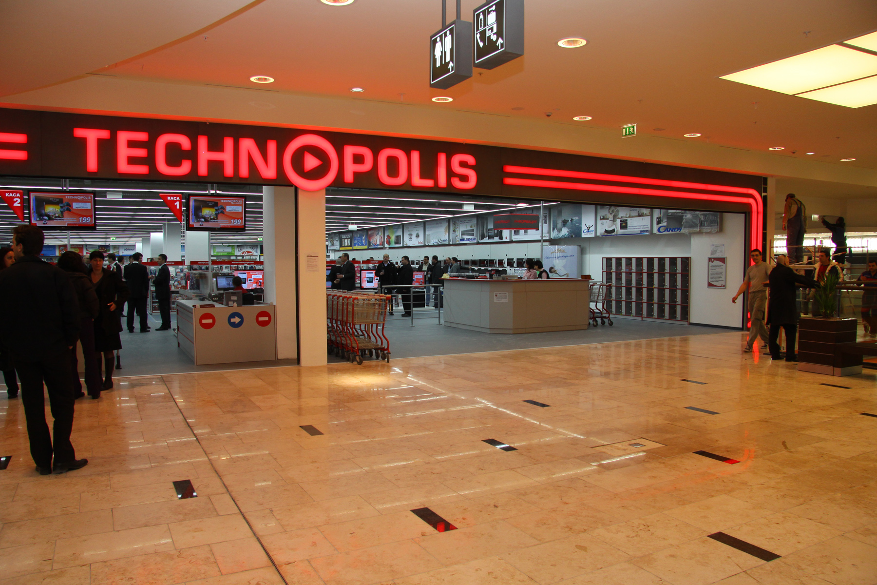 Магазин на Технополис в Мол Сердика